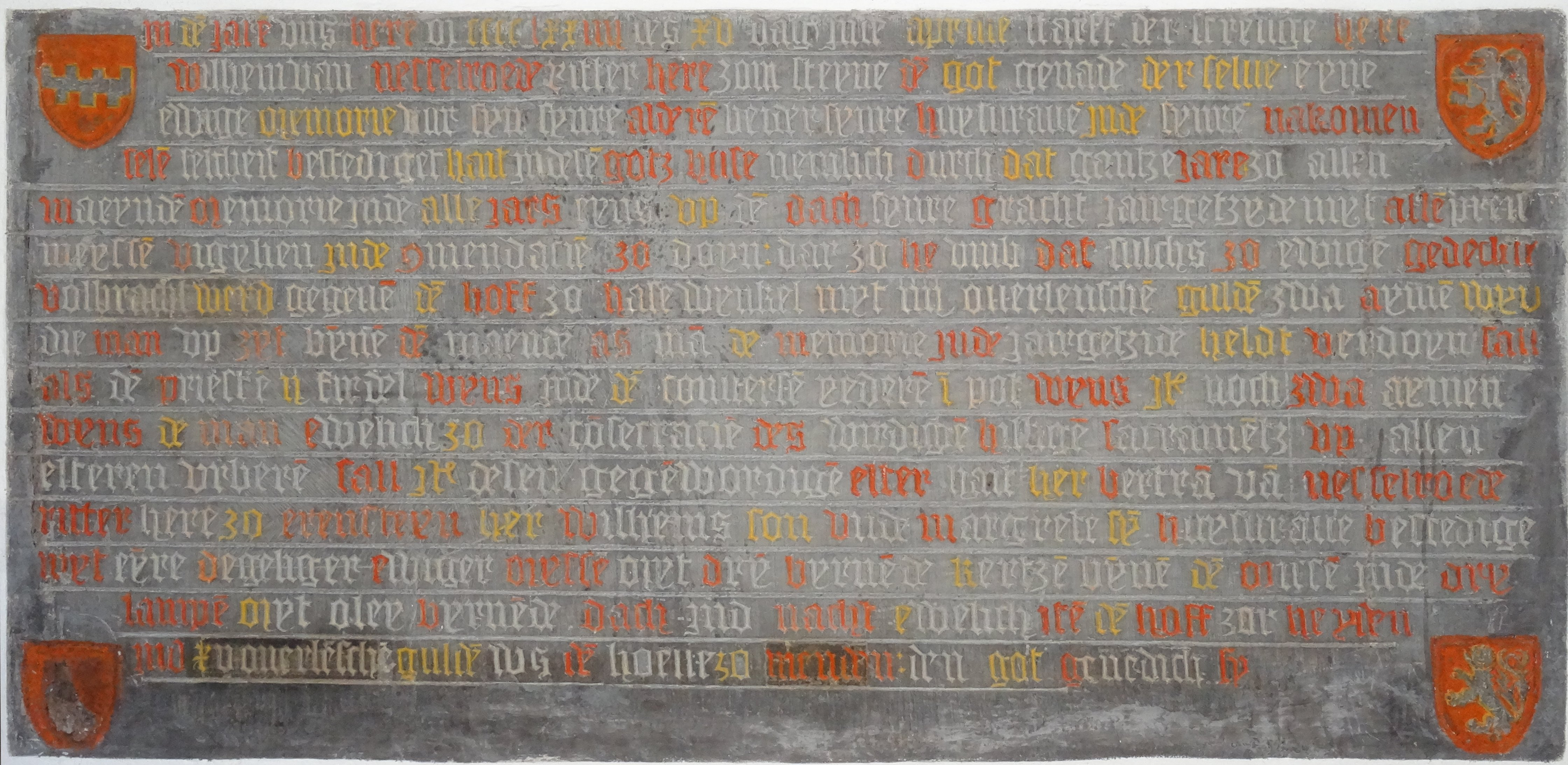 Stiftungstafel rechts